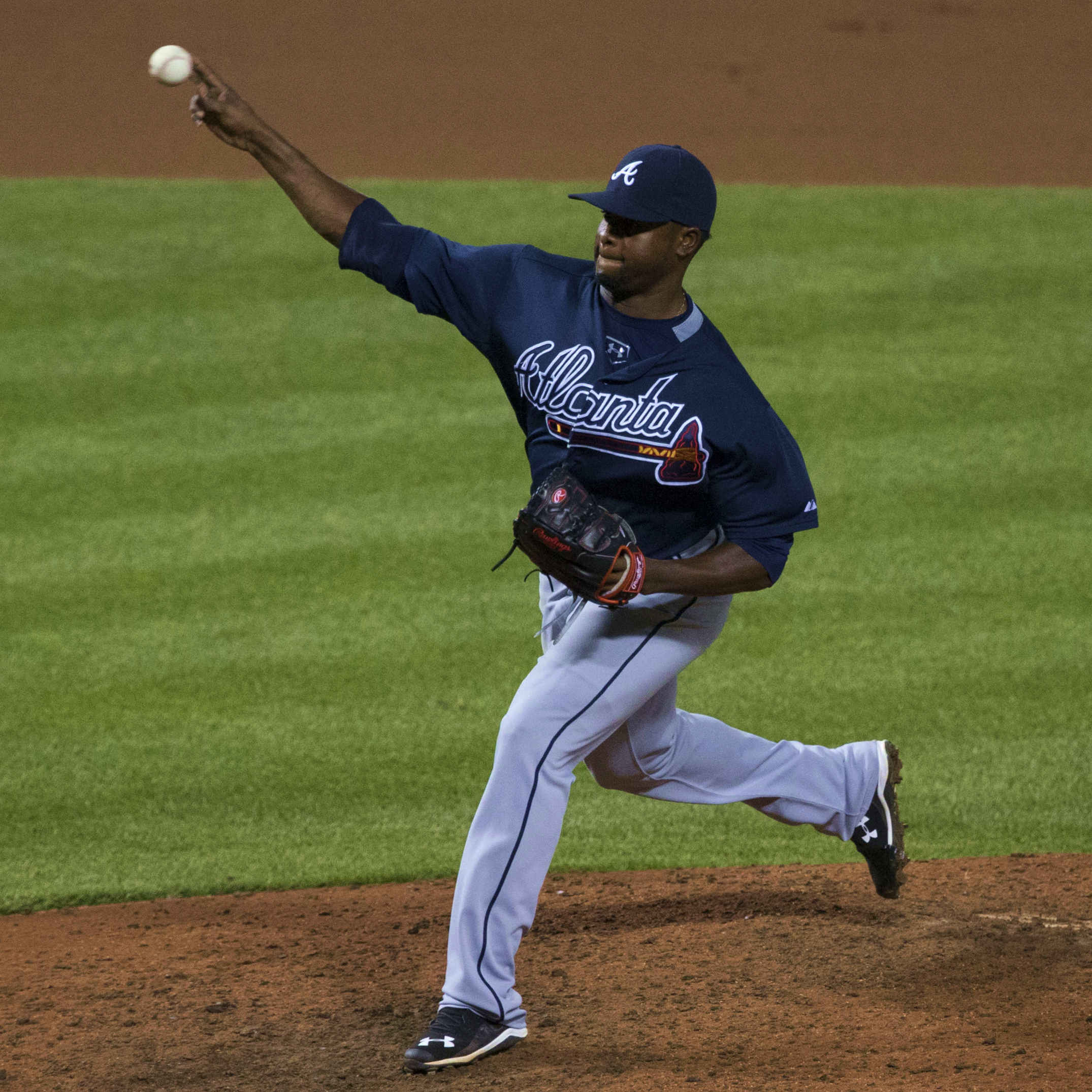 Arodys Vizcaíno